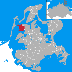 Schaprode, Landkreis Rügen, Mecklenburg-Vorpommern